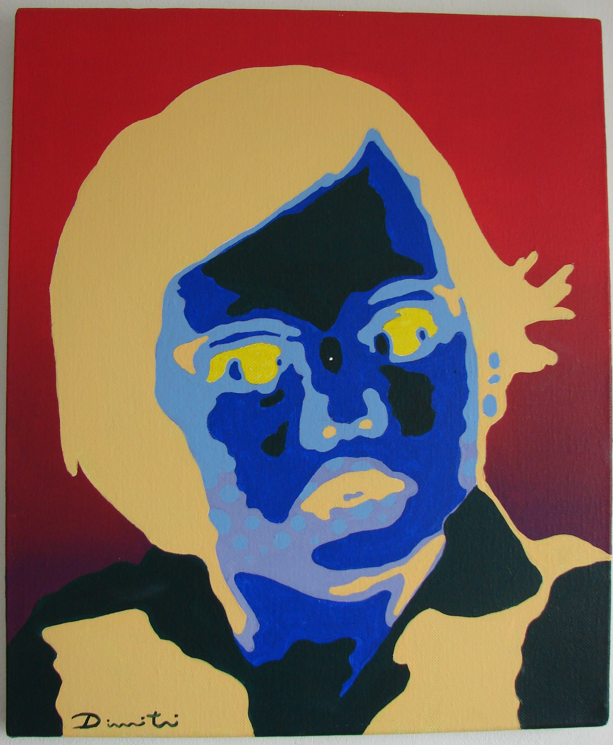 Peinture sur toile d'Angelo en négatif par Dimitri Parant